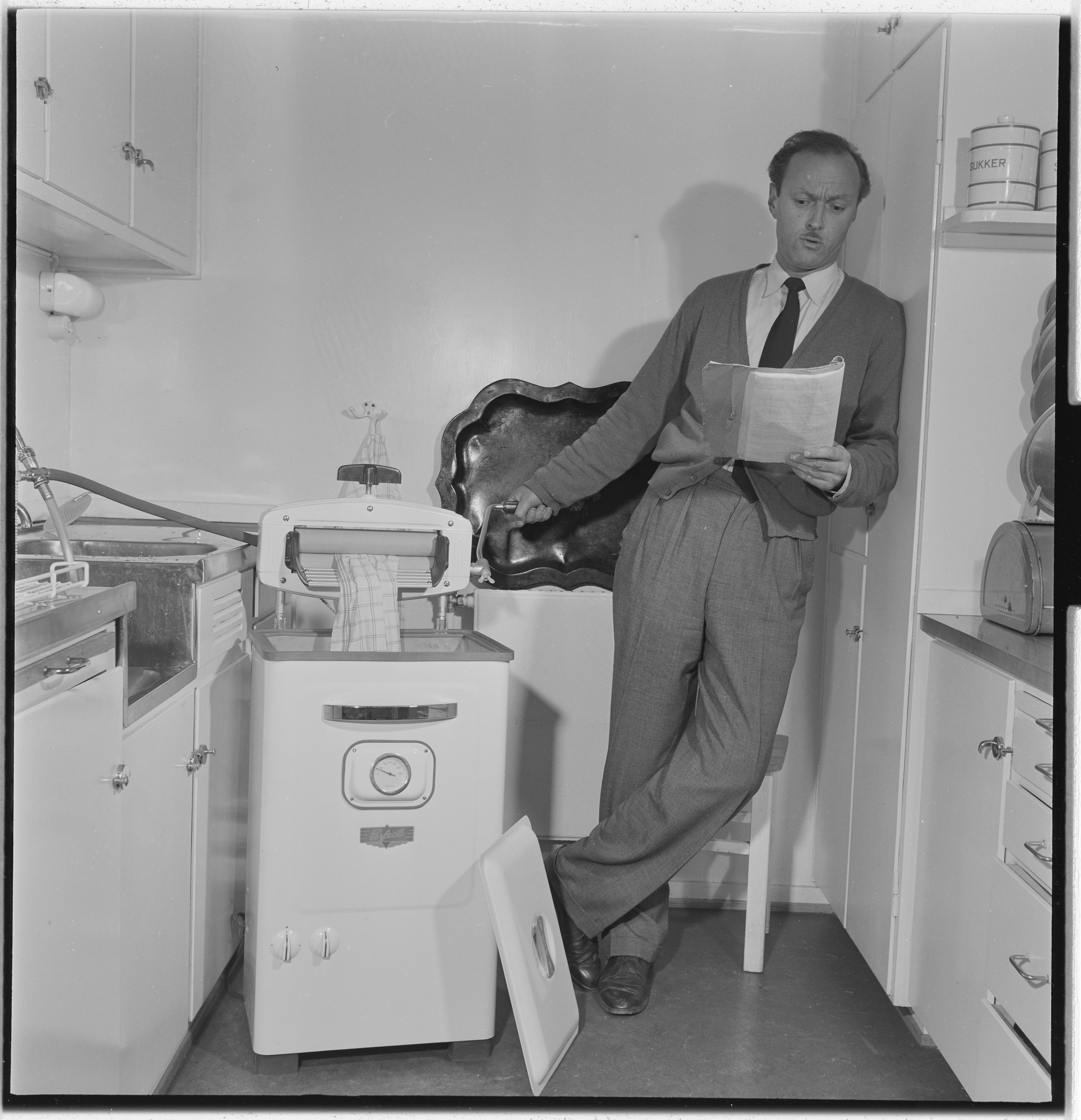 Bildet er hentet fra Arkivverket. Perfect vaskemaskin. Frank Robert og Randi Brenne. Annonse. Arkivinstitusjon : Riksarkivet Arkivnavn : Billedbladet NÅ Sted : Norge, Ukjent, Ukjent, Ukjent Emneord: reklame, vaskemaskin, skuespillere, menn, kvinner, husarbeid Avbildet: Robert, Frank